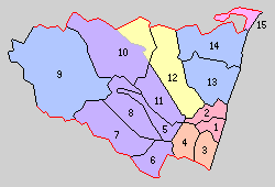 宮崎県児湯郡の町村制時点の町村。